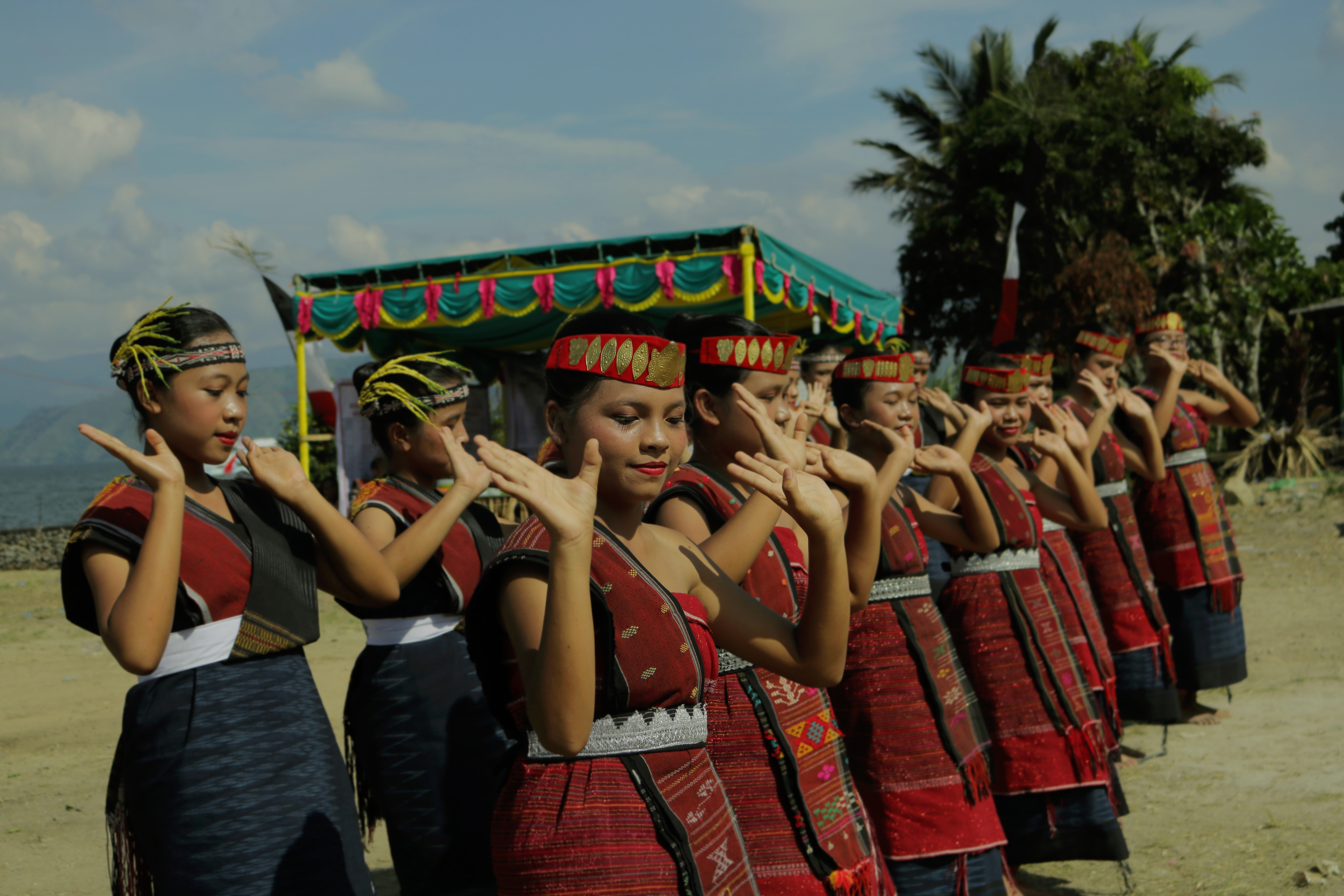 Persembahan tari (tortor) dari salah satu sanggar dari daerah Tomok, pada saat perayaan pesta gondang naposo pada bulan Januari 2020 lalu.. Pesta gondang naposo merupakan salah satu agenda tahunan dalam budaya batak Gondang naposo (pesta budaya muda-mudi) tujuan nya menjadi ajang atau tempat muda mudi untuk mencari jodoh atau pasangan sembari menjalin silaturahmi antara pemuda pemudi desa yang satu dengan yang lain